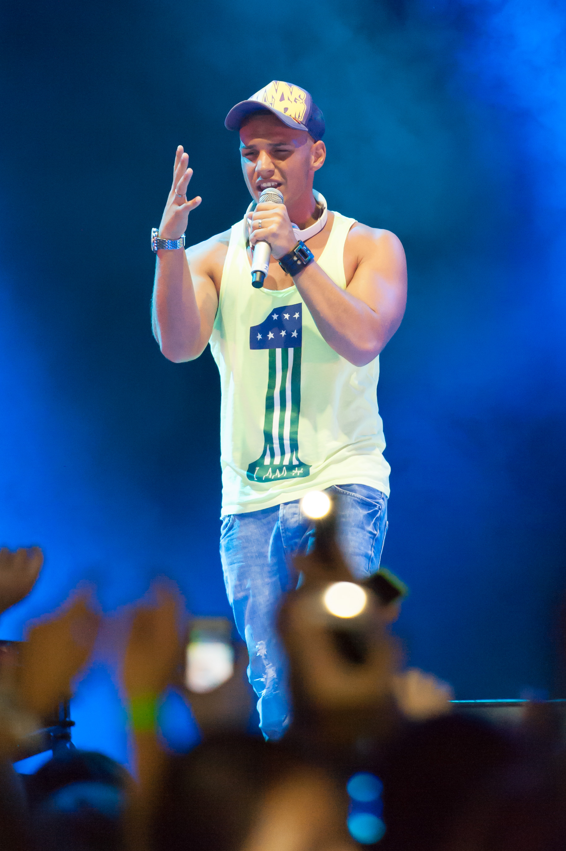 DSDS - Live on Tour 27. Juli 2014, Stadthalle Wien Pietro Lombardi